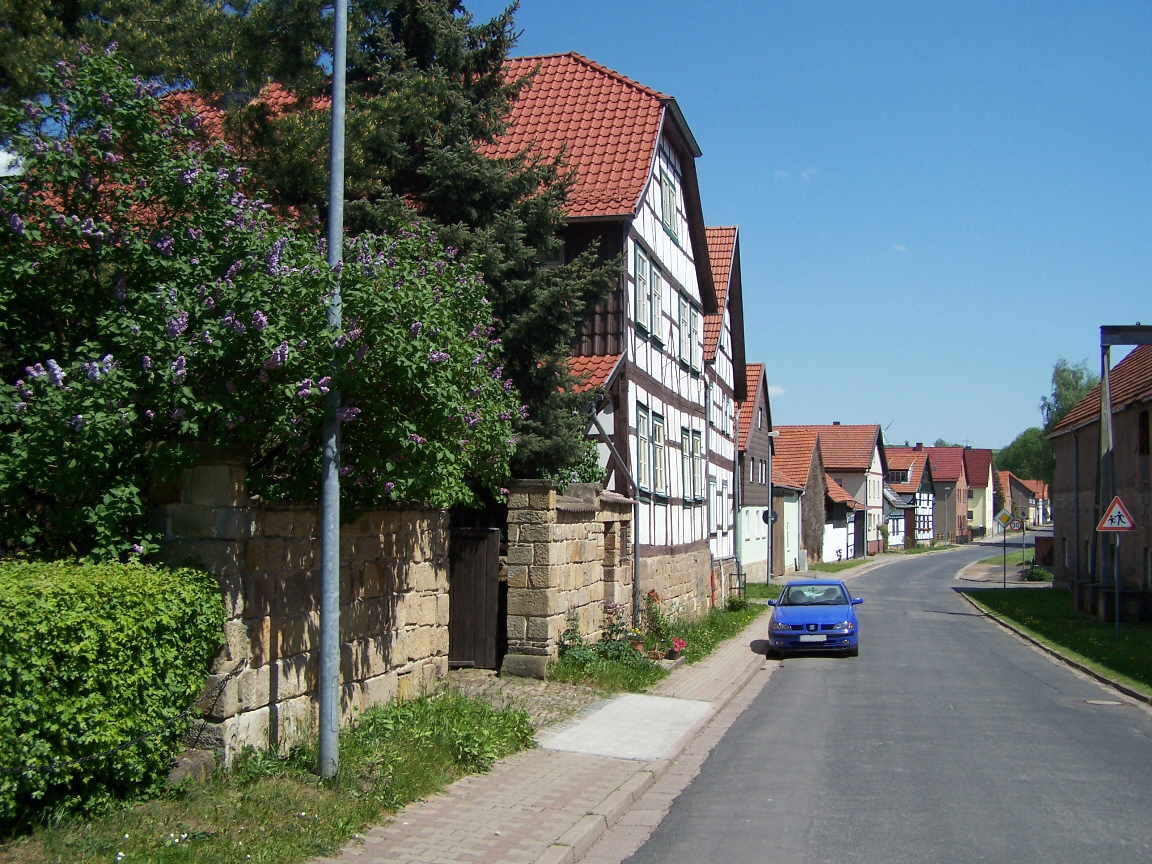 Madelungen